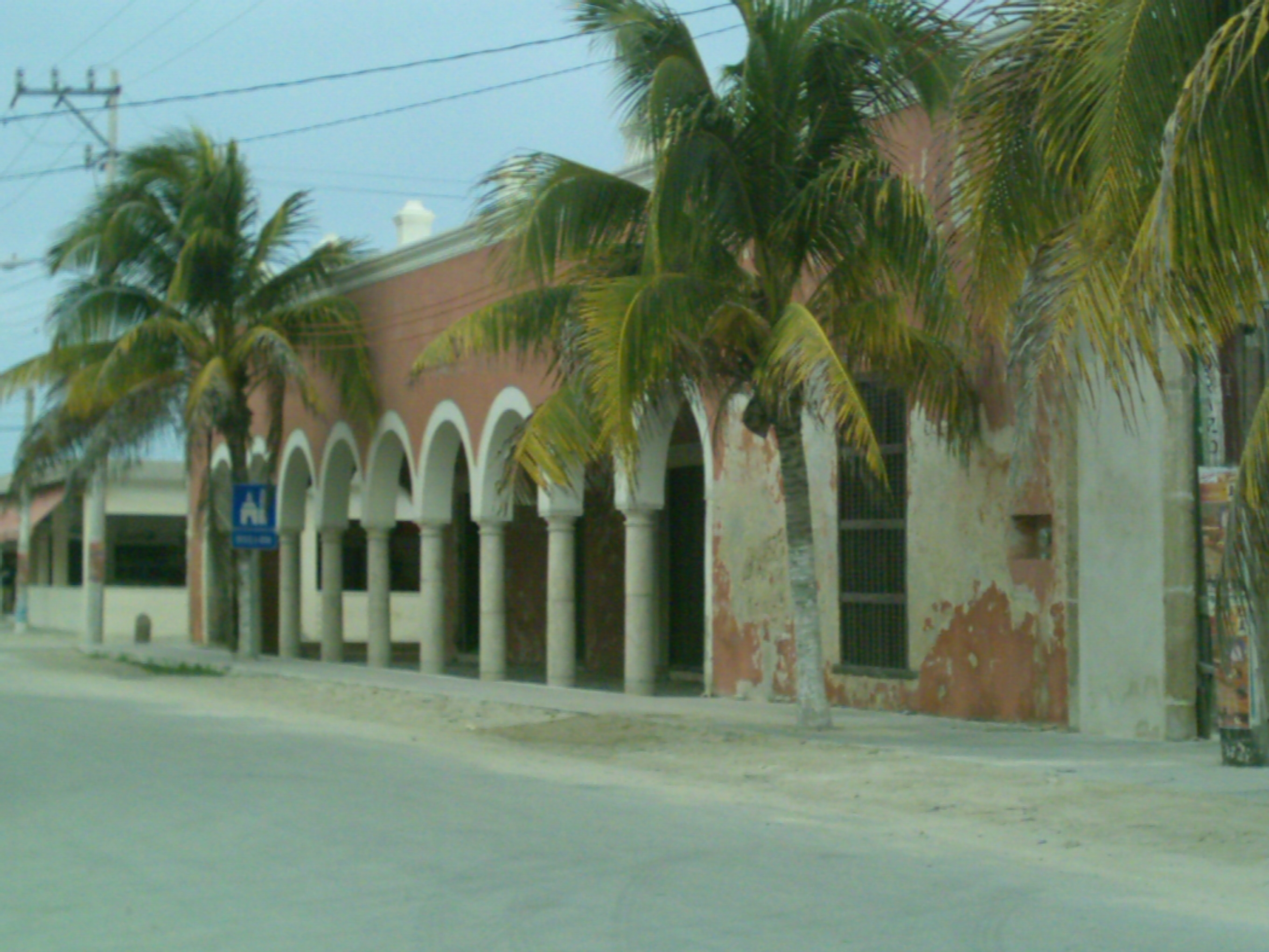 Foto de la antigua aduana de Sisal.